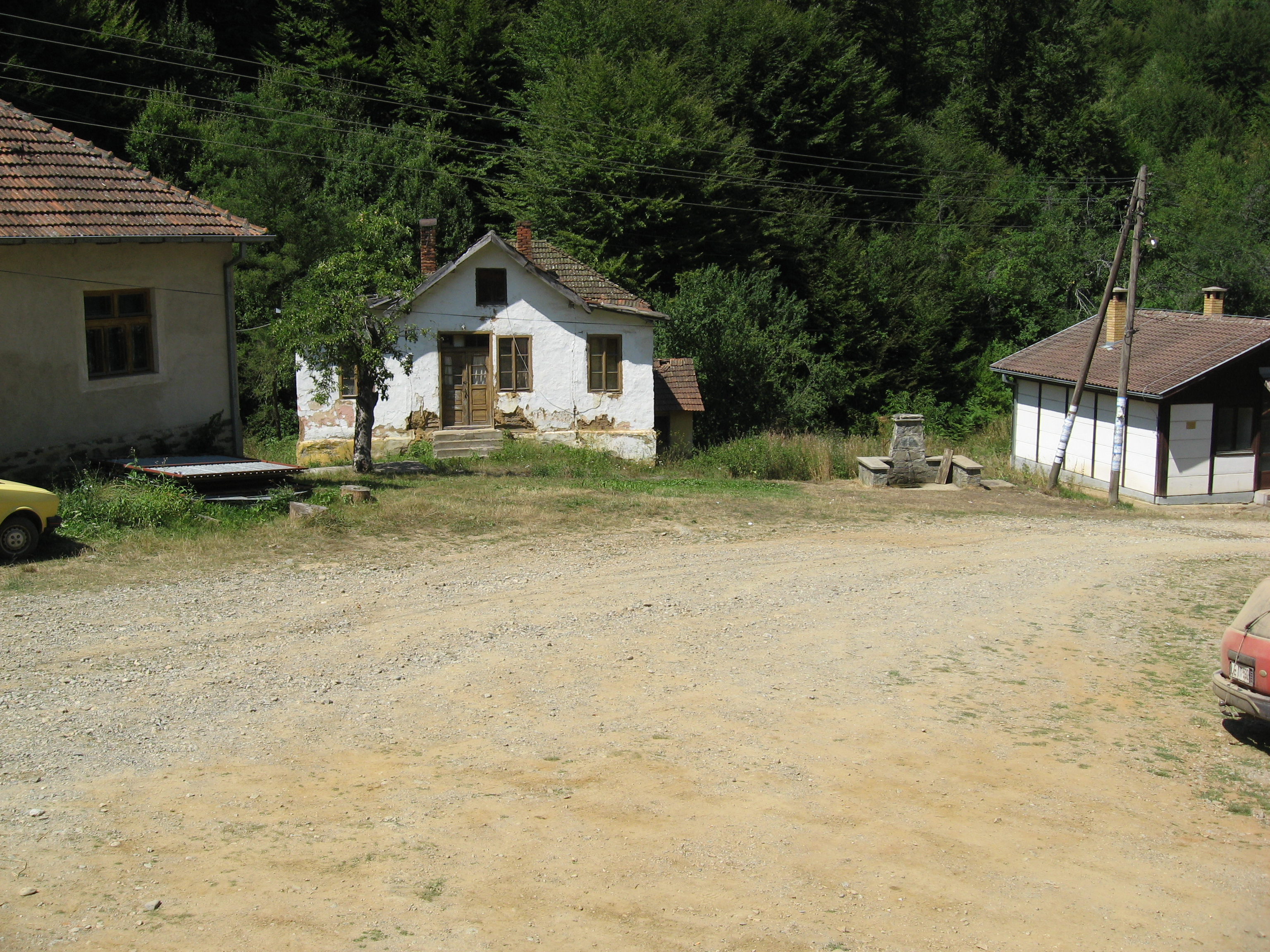 Центар села Дарковце, фотографисано 19. августа 2011. године.